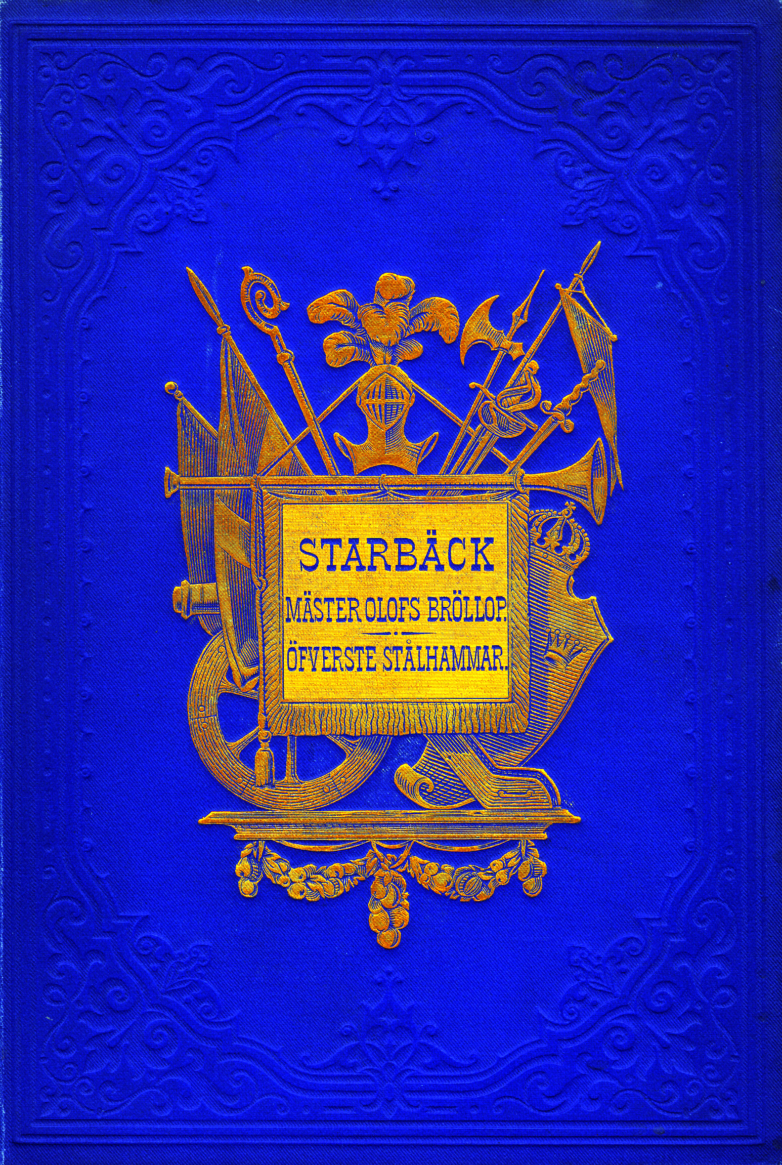 Binding cover: Mäster Olofs bröllop : romantiserad berättelse från Gustaf I:s första regeringsår / Carl Georg Starbäck